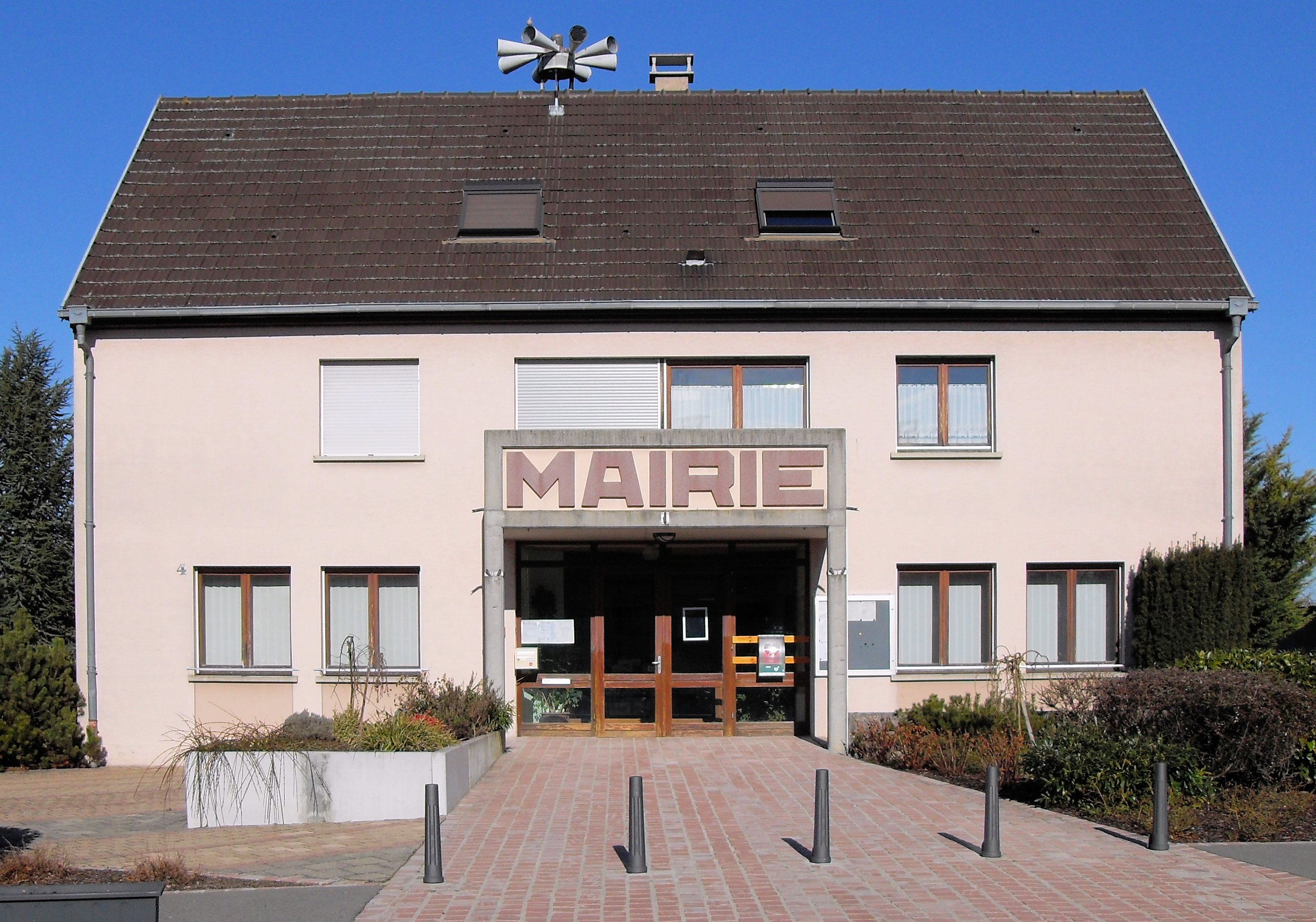 La mairie de Roggenhouse